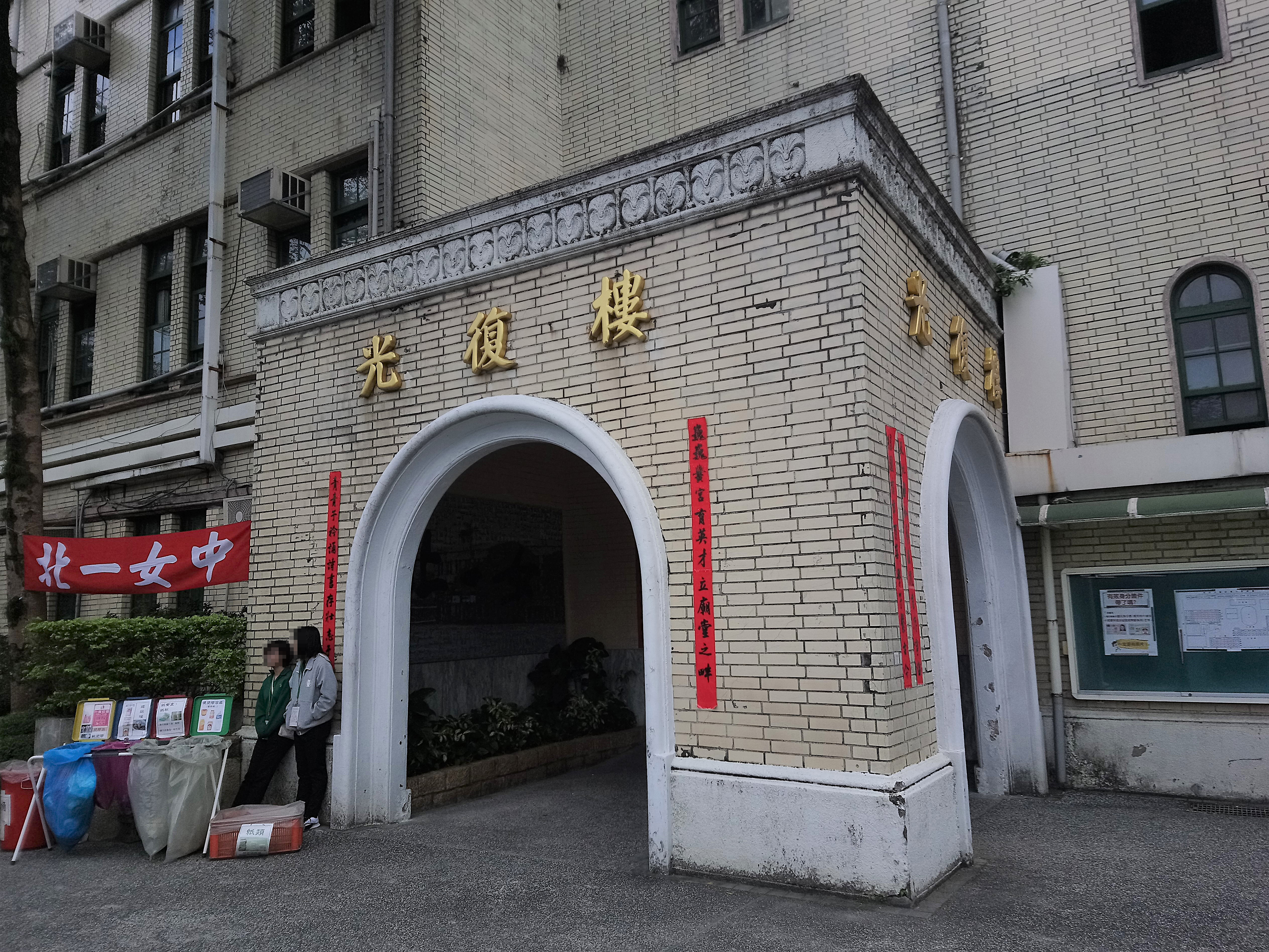 臺北市立第一女子高級中學光復樓玄關,臺北市中正區城內次分區建國里